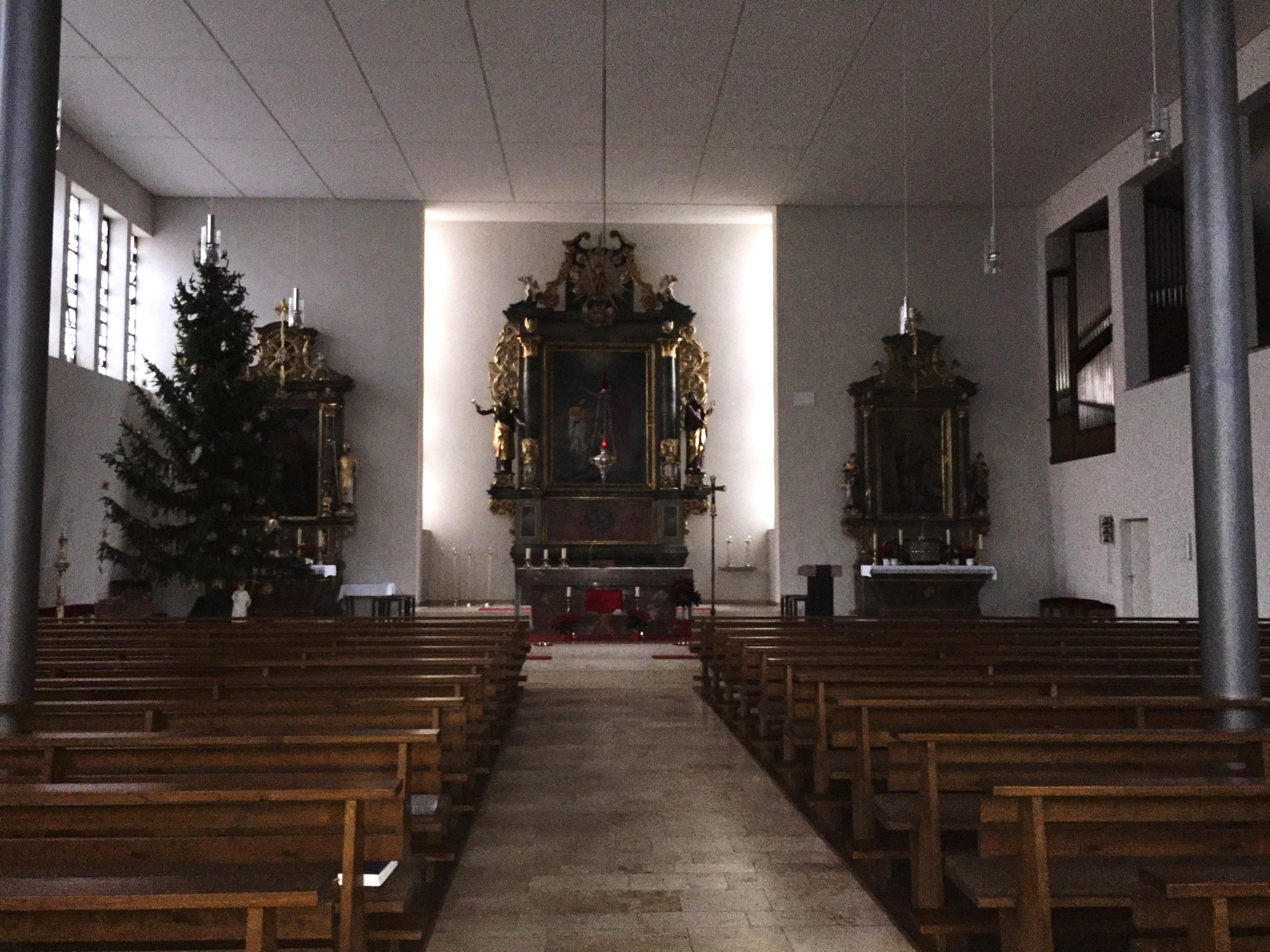 St. Johannes der Täufer (Gerchsheim)